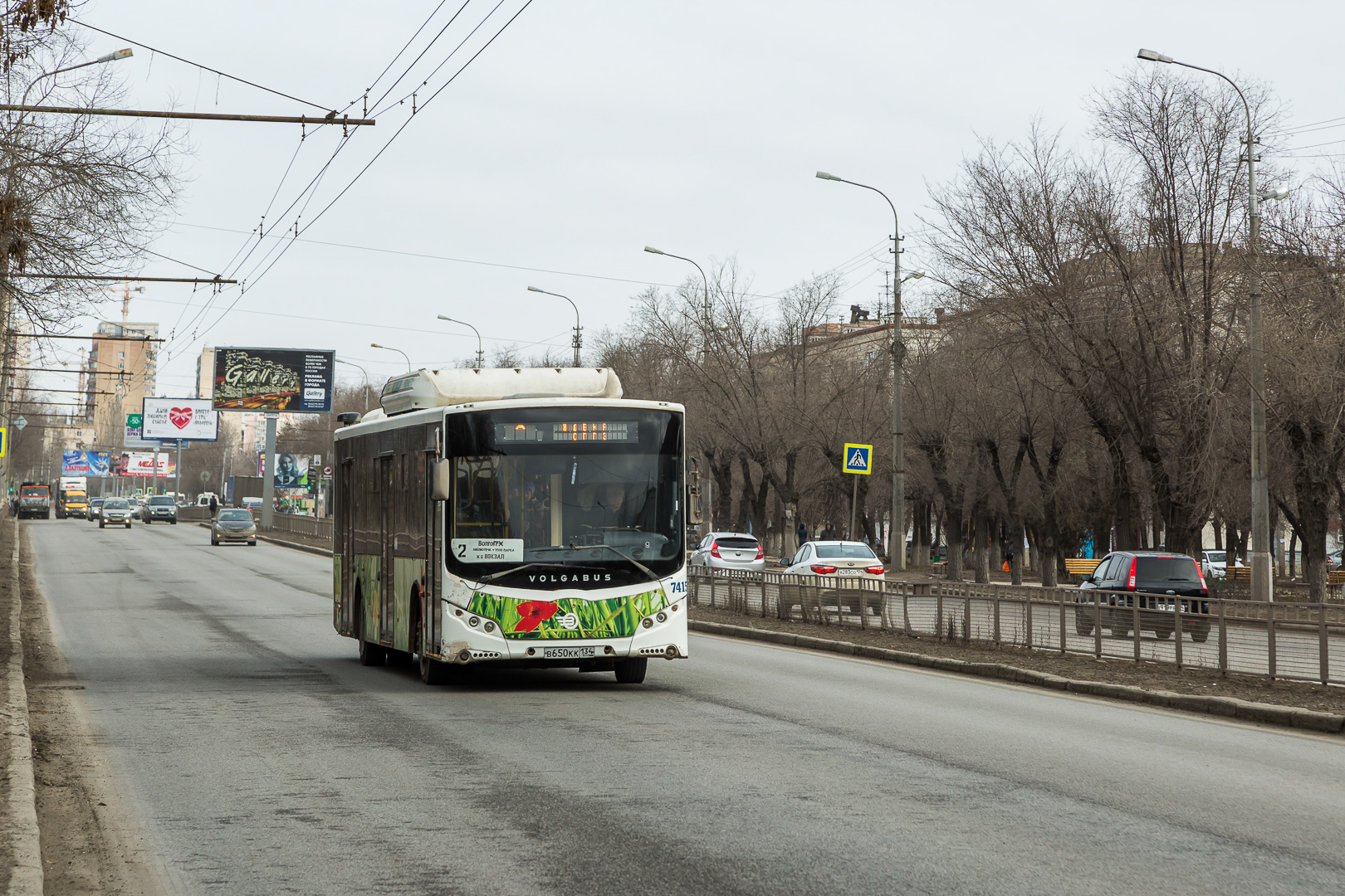 Автобус Volgabus-5270.G2 на маршруте № 2 в Волгограде